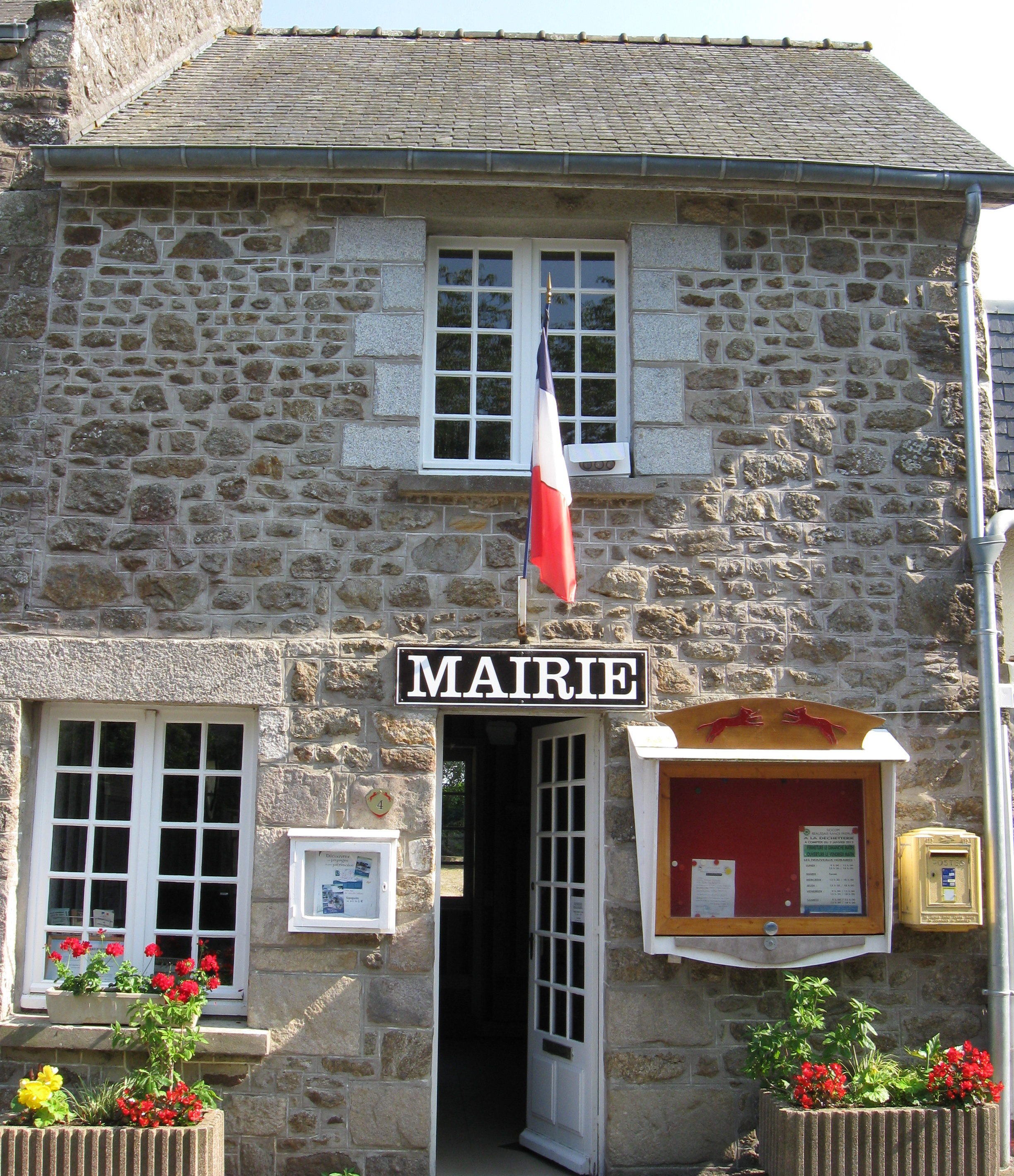 Mairie de Plessix-Balisson. (Côtes-d'Armor, région Bretagne).